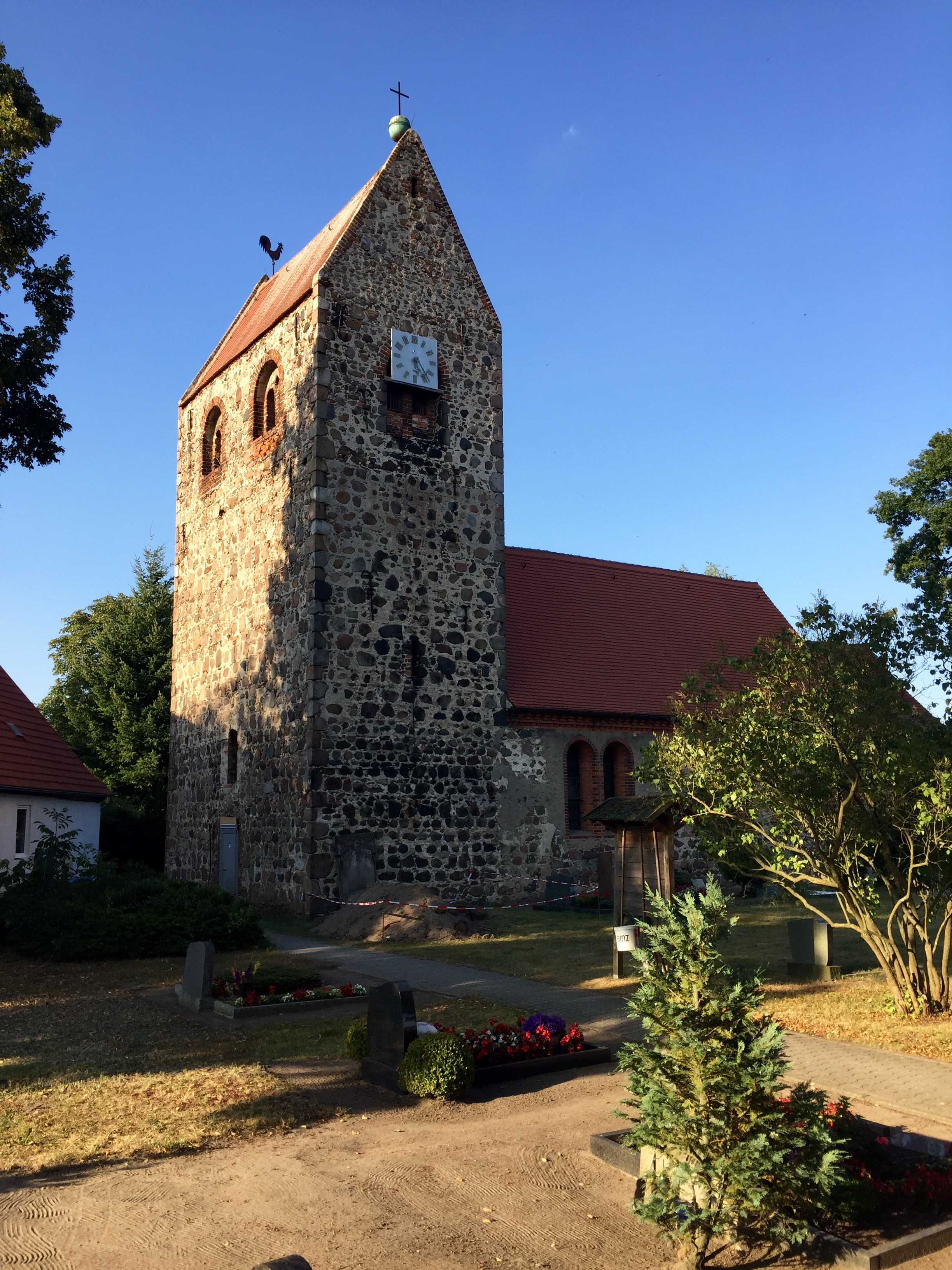 Kirche in Walsleben 2016